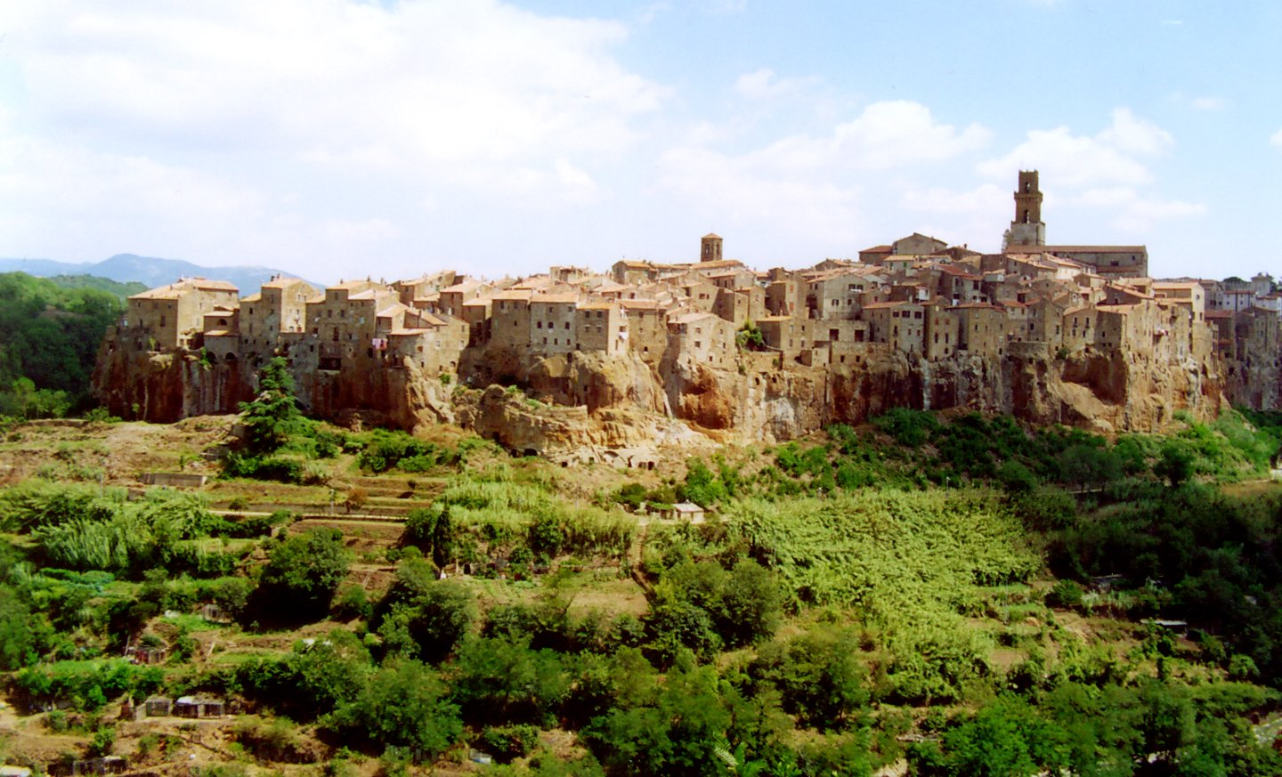 Pitigliano, Toscana, Italiapittigliano in italy